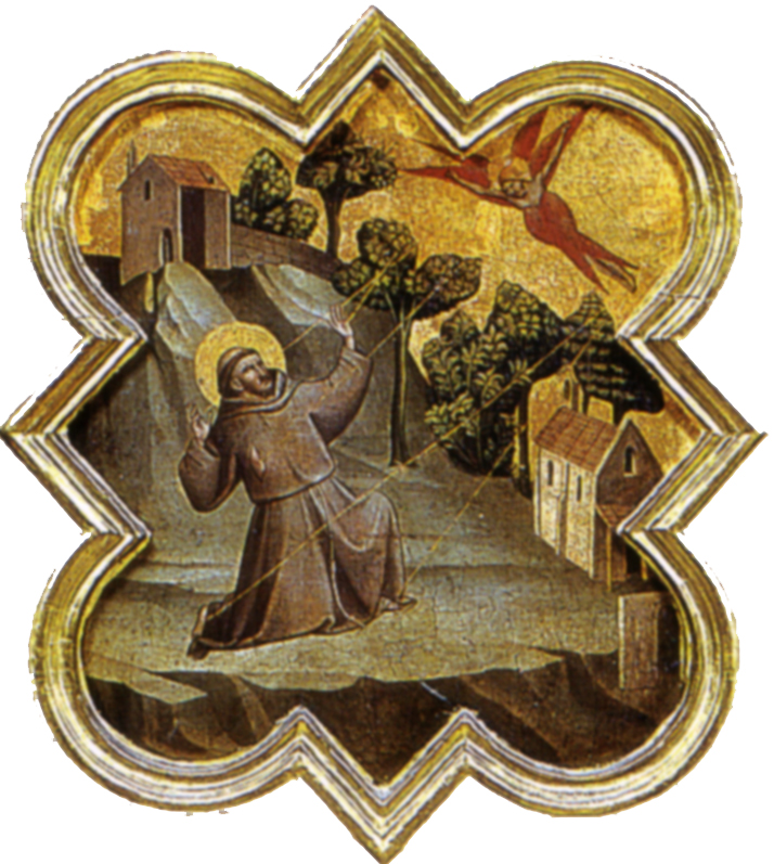 Taddeo gaddi, formelle dell'armadio della sacrestia di santa croce, 03 stimmate di san francesco